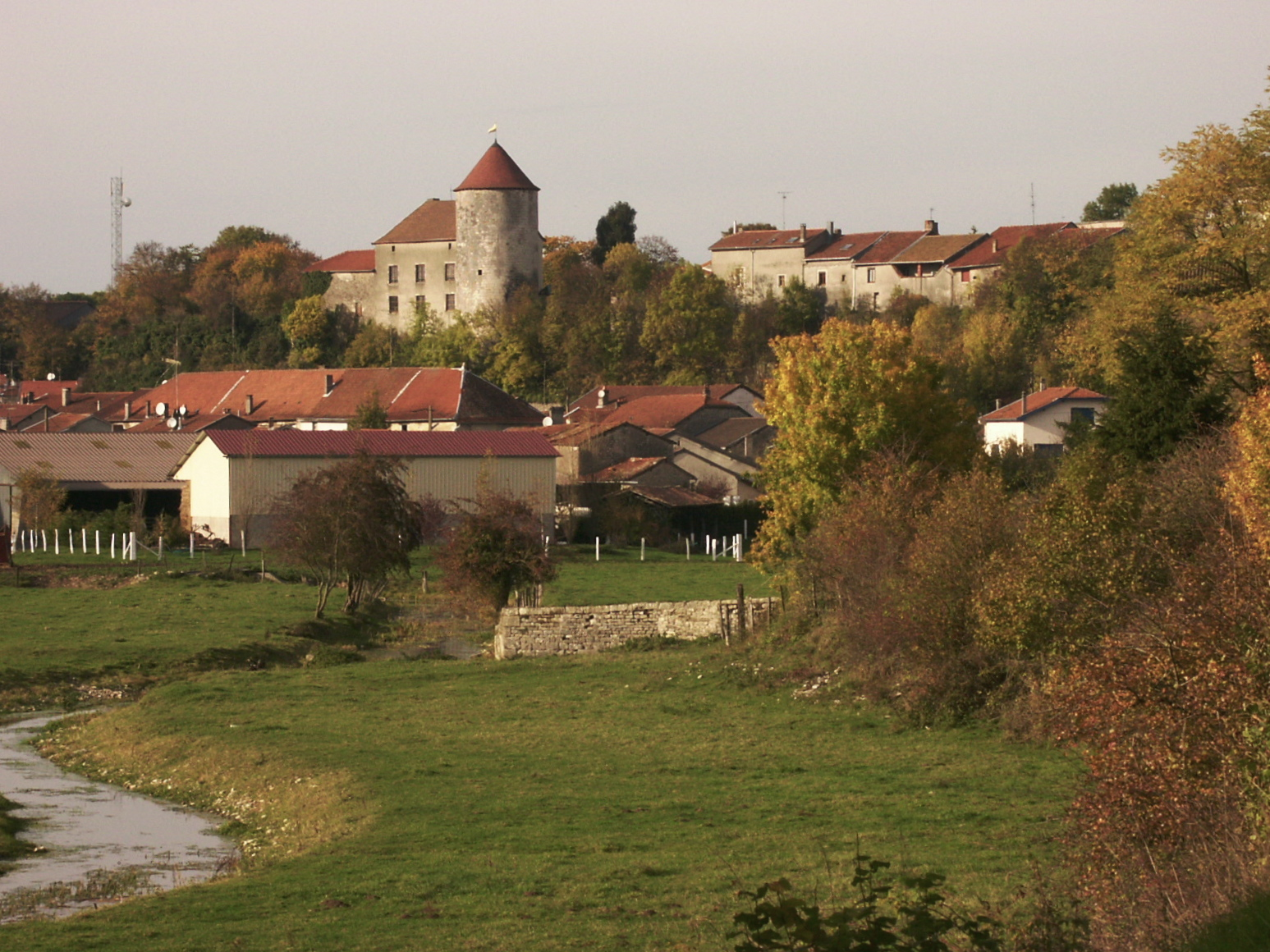 Entrée sud de Gondrecourt le château